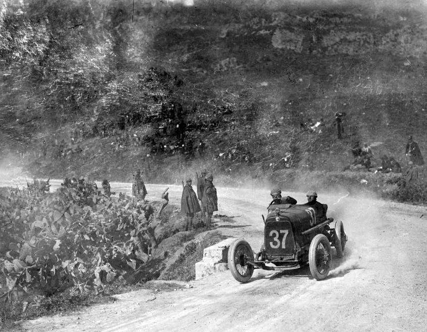 Enzo Ferrari à la Targa Florio 1922 (16e).